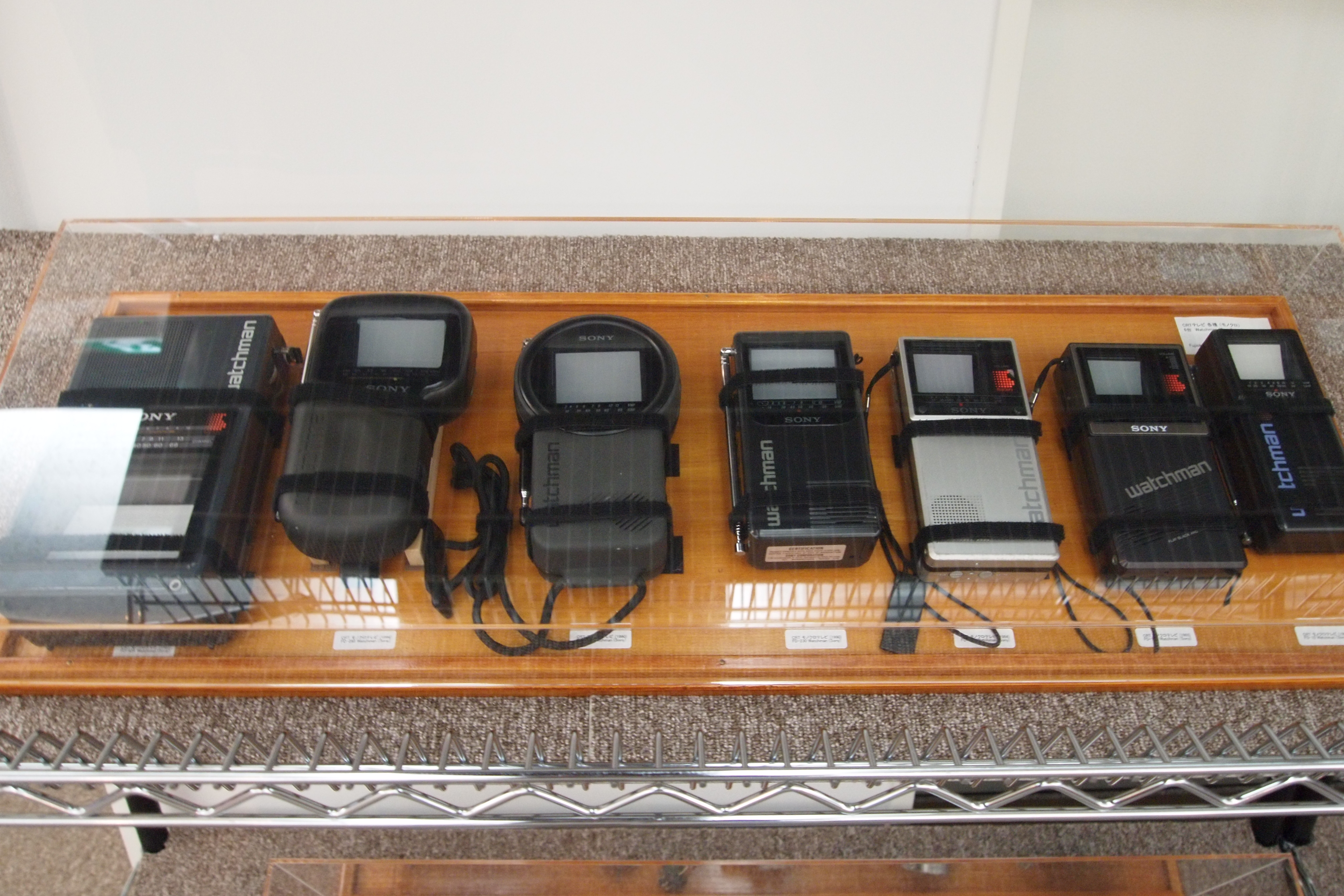 Models of Sony Watchman. In Takayanagi Memorial Hall at Hamamatsu Campus of Shizuoka University. ("Takayanagi" means Kenjiro Takayanagi)